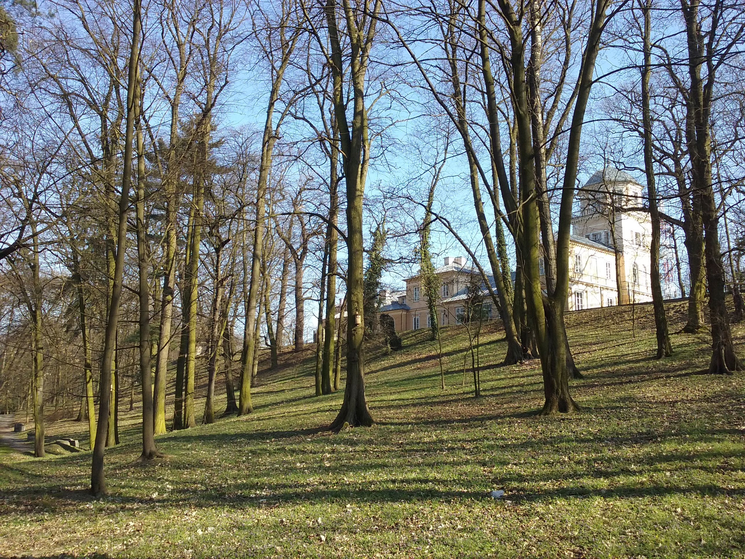 Tomaszów Mazowiecki w województwie łódzkim, PL, EU. Widok na Pałac Ostrowskich z parku im.Solidarności. CC0